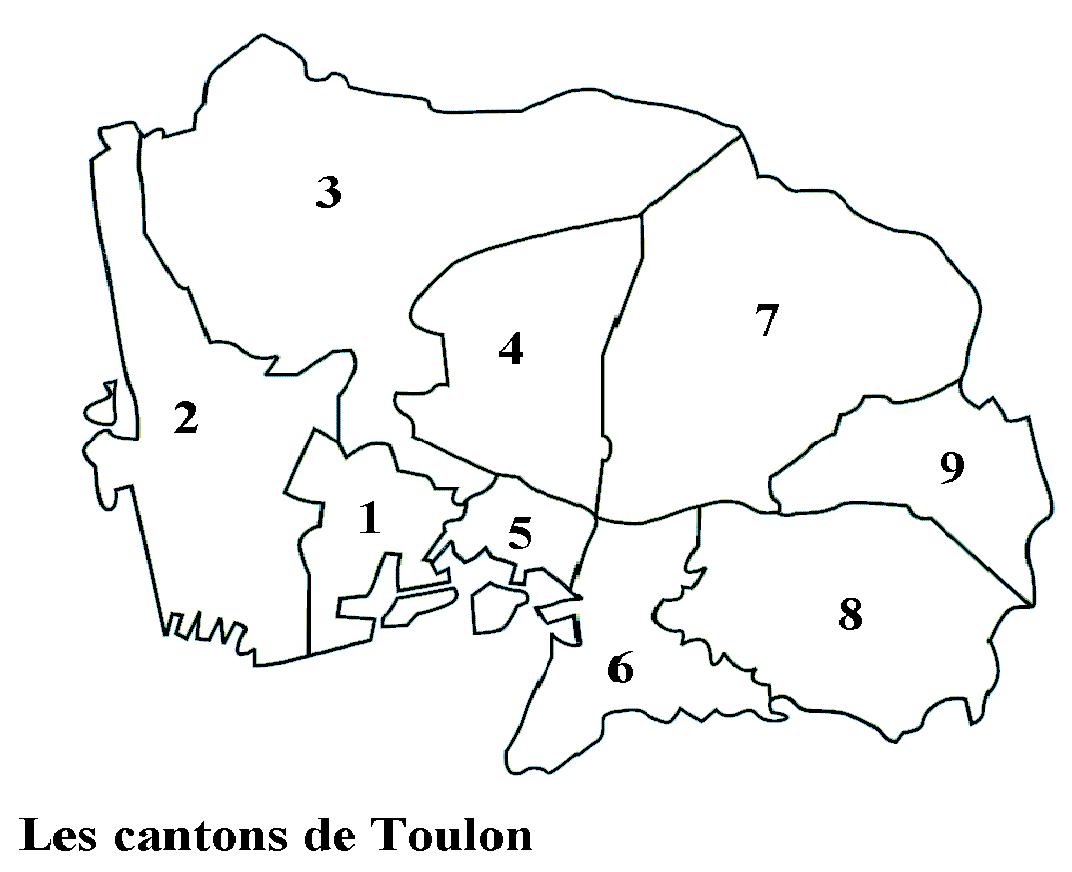 Le découpage des cantons dans la ville de Toulon (Var)